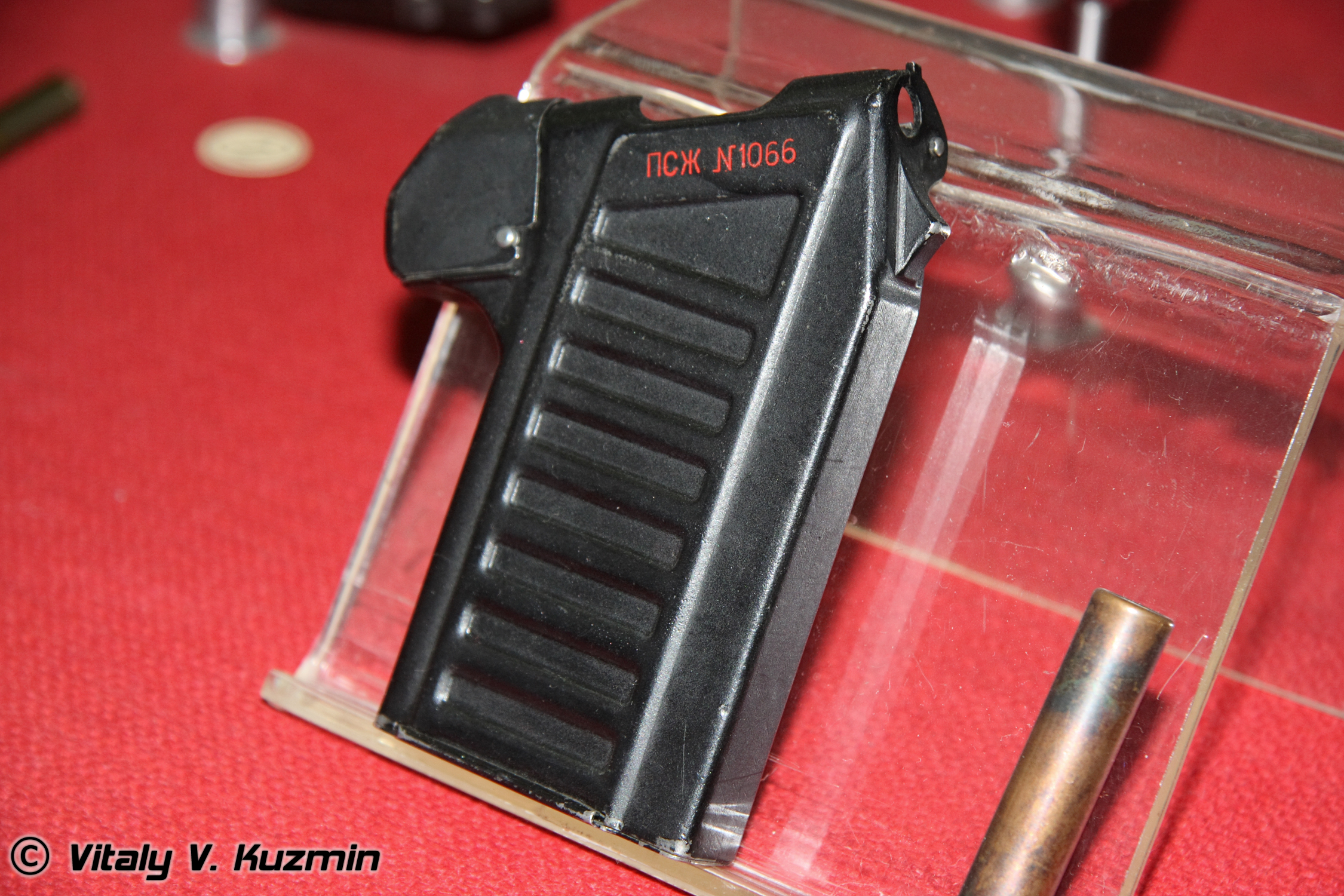 Пистолет спец. жидкостный ПСЖ (Special liquid firing pistol PSZh)